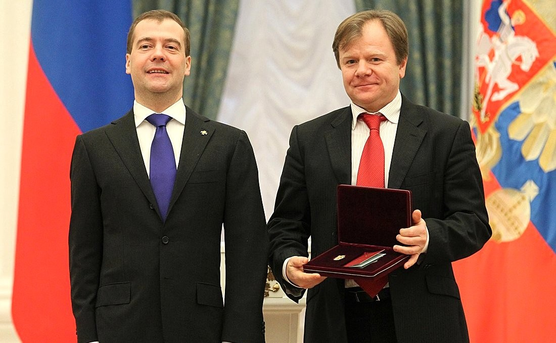 Музыканту Игорю Бутману присвоено звание «Народный артист Российской Федерации».